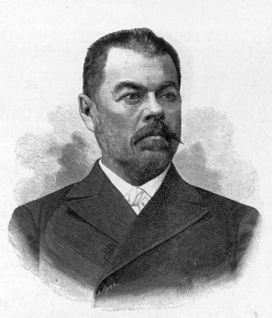 Григорий Андреевич Янчевецкий, русский филолог-классик, педагог, директор Александровской и Николаевской гимназий в Ревеле.